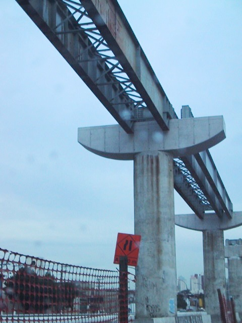 um drama paulistano. uma obra que virou novela. um motivo a mais pra enfeiar a cidade. projetado pela gestão do prefeito celso pitta, o tal do fura-fila foi rebatizado várias vezes e agora foi inaugurado como mais um remendo para o sistema de transporte coletivo da cidade. a foto é de 2003, quando as colunas superfaturadas serviam apenas para entristecer a paisagem.